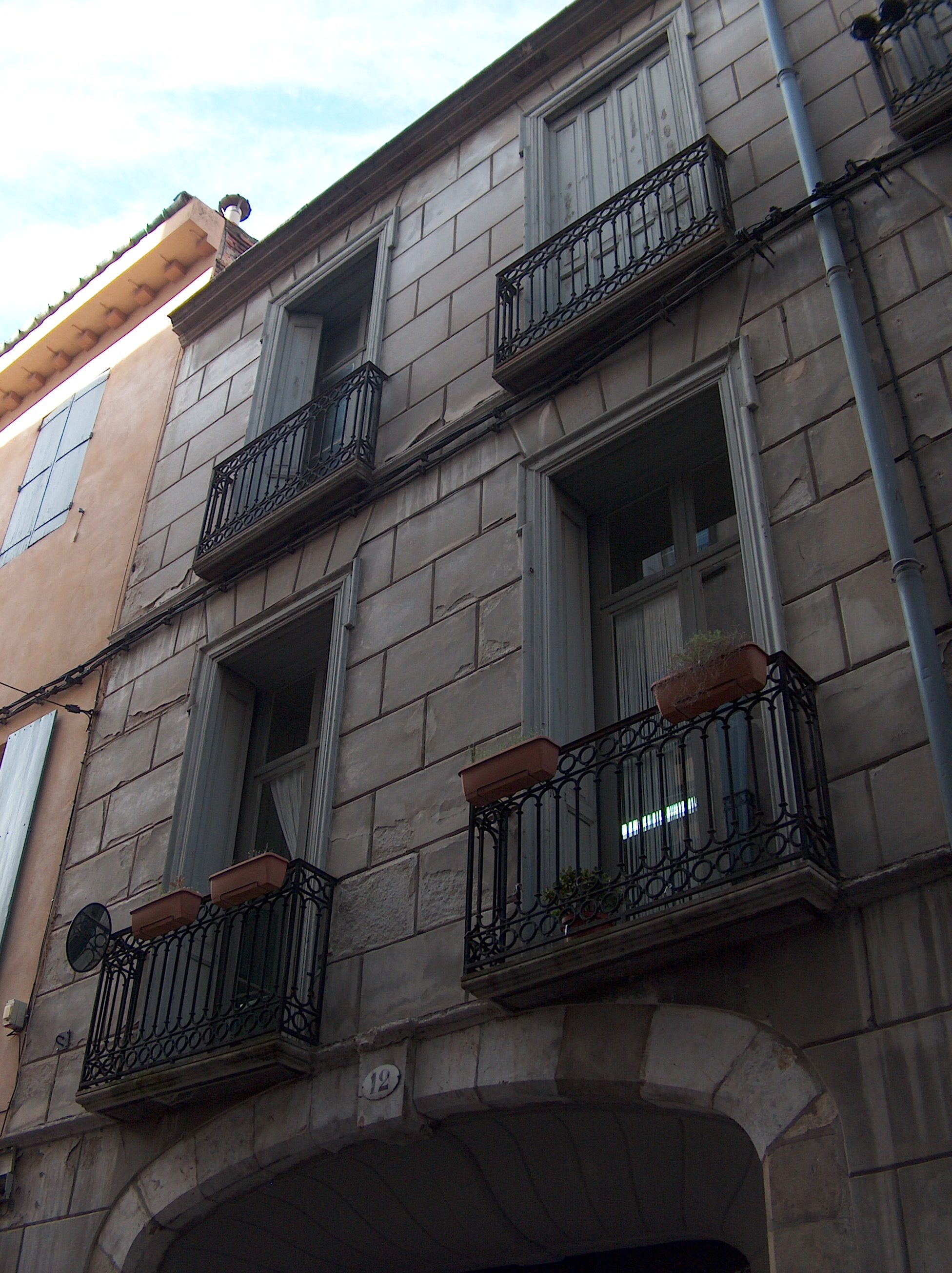 Immeuble où à vécu l'écrivain Claude Simon